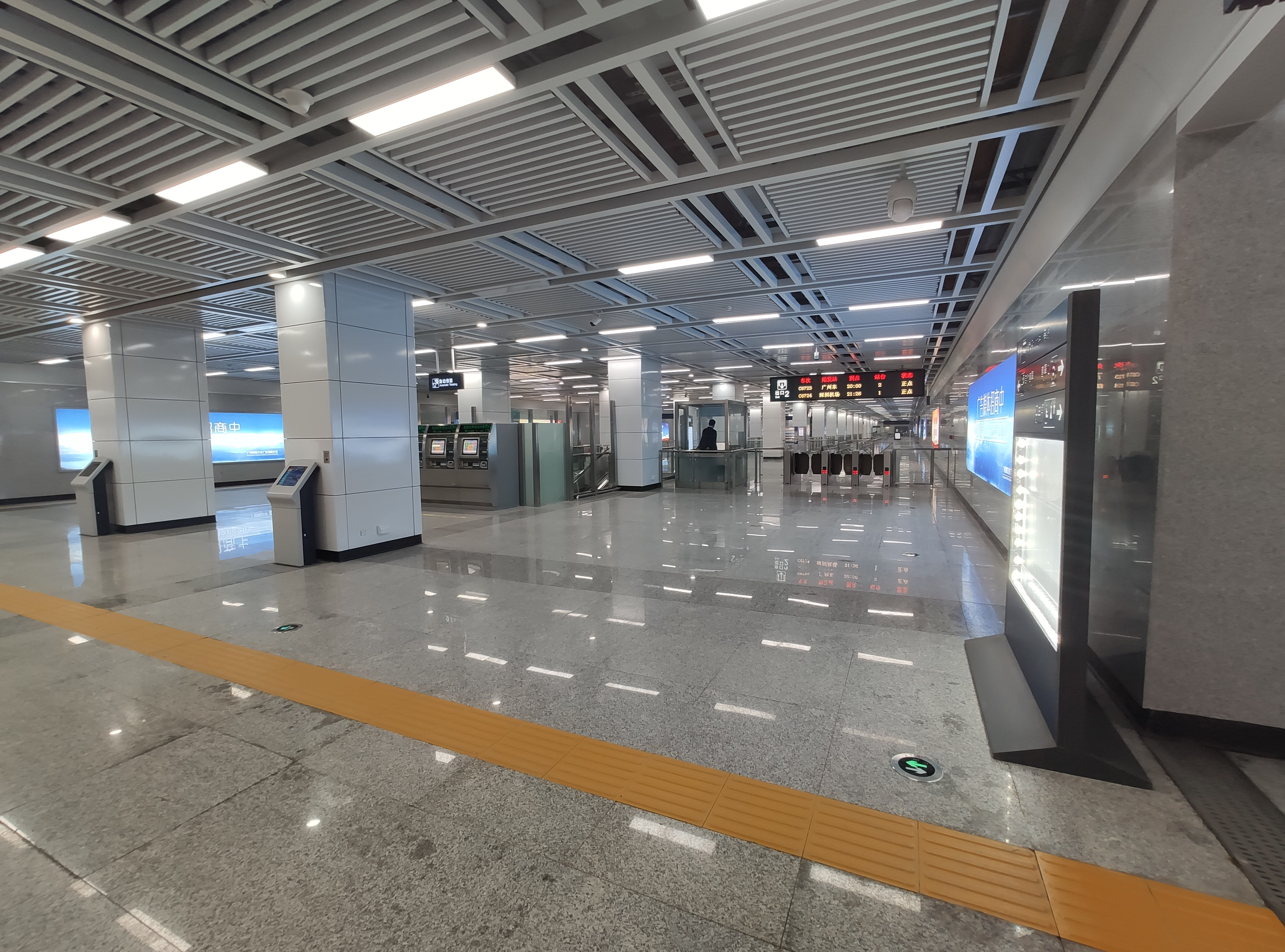 中文（中国大陆）: 穗深城际 深圳机场北站 站厅